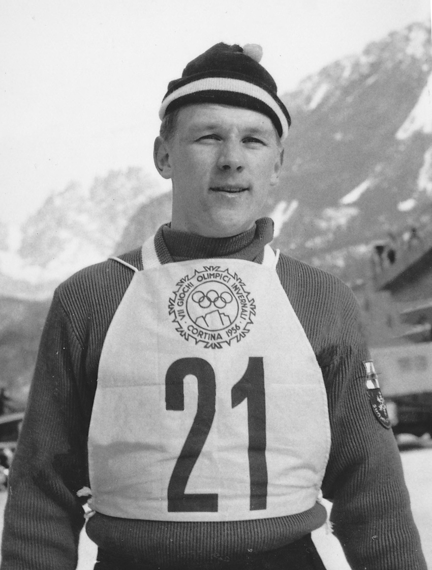 Antti Hyvärinen